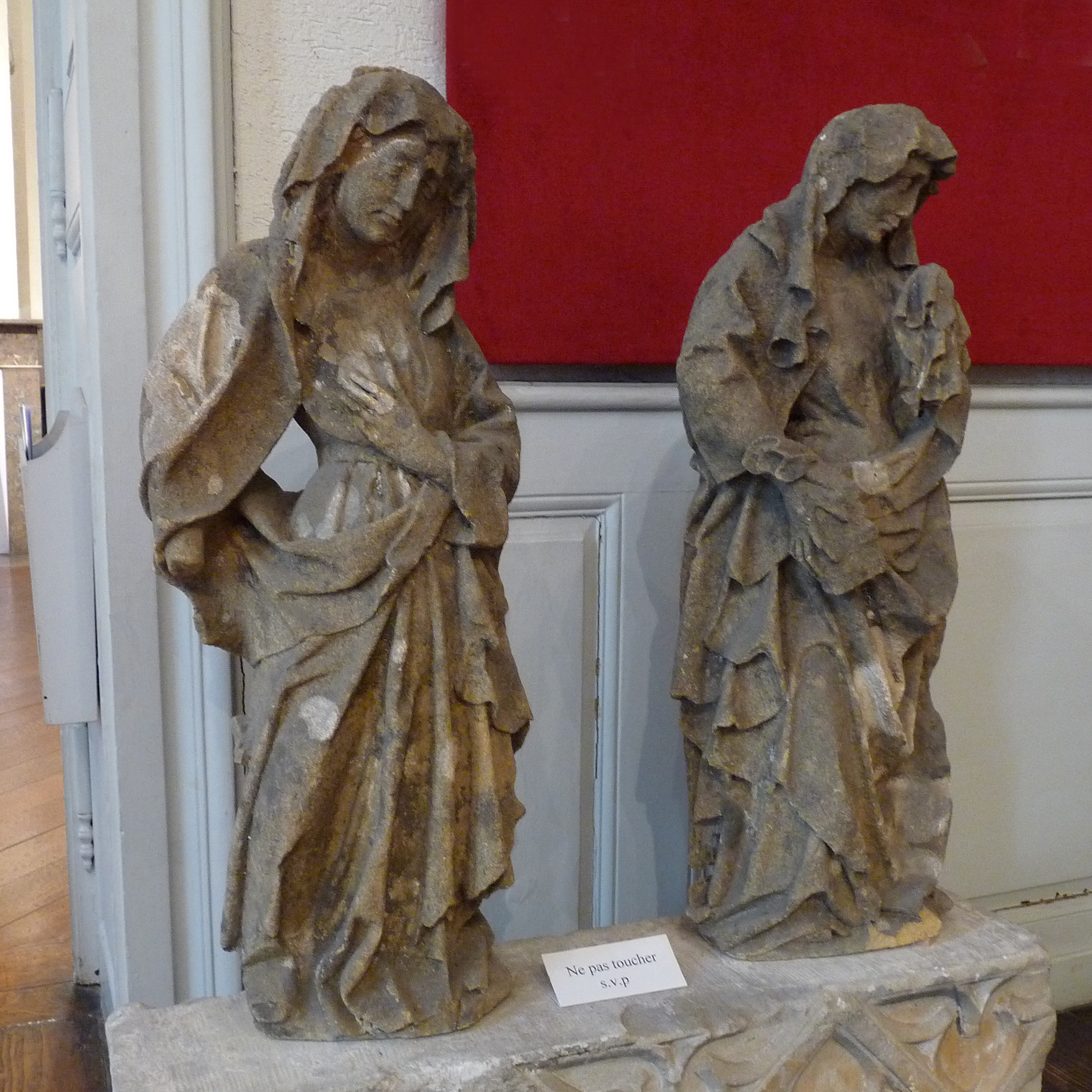 Les pleureuses, statues en grès du XVe siècle. Elles se trouvaient sur le tombeau de l'abbesse Alix de Parroye, au cimetière du Chapitre de Remiremont. Elles sont aujourd'hui exposées au musée Charles de Bruyères à Remiremont.